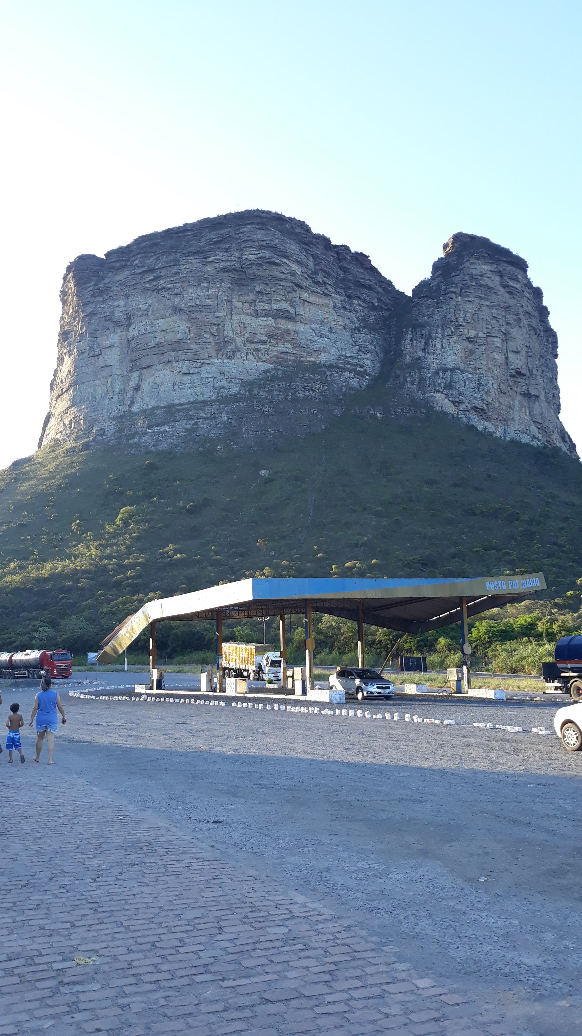 Este é um posto de gasolina desativado e que virou parada turística na base do morro do pai Inácio...